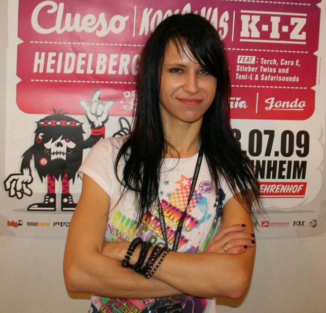 Maarja Kivi nach einem Auftritt im Vorprogramm von LaFee im Mannheimer Maimarktclub